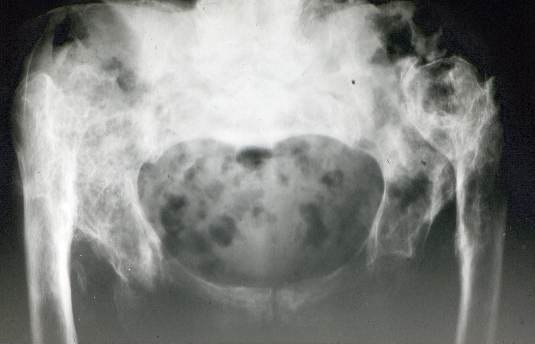 Röntgenaufnahme vom Becken einer älteren Frau: Nicht operierte angeborene Hüftluxation beiderseits.